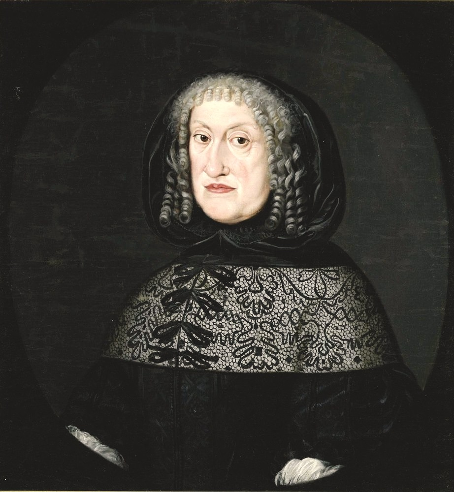 Eleanor of Anhalt-Zerbst (1608-1681), Herzogin von Schleswig-Holstein-Norburg